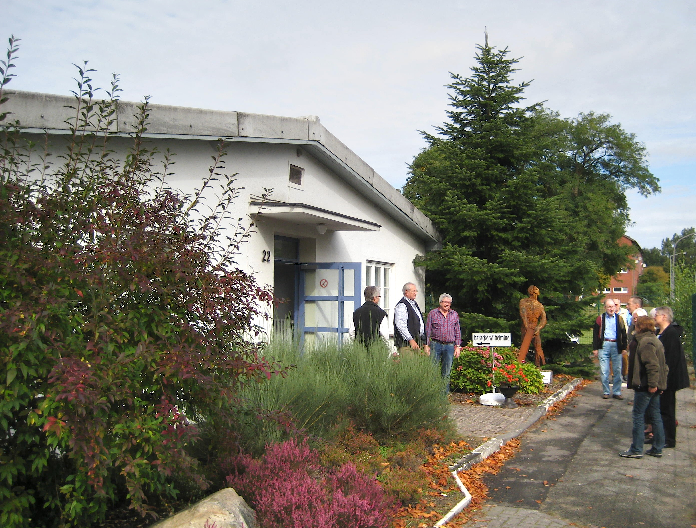 Eingangsbereich der Gedenkstätte Baracke Wilhelmine in Schwanewede-Neuenkirchen in Niedersachsen/Deutschland.